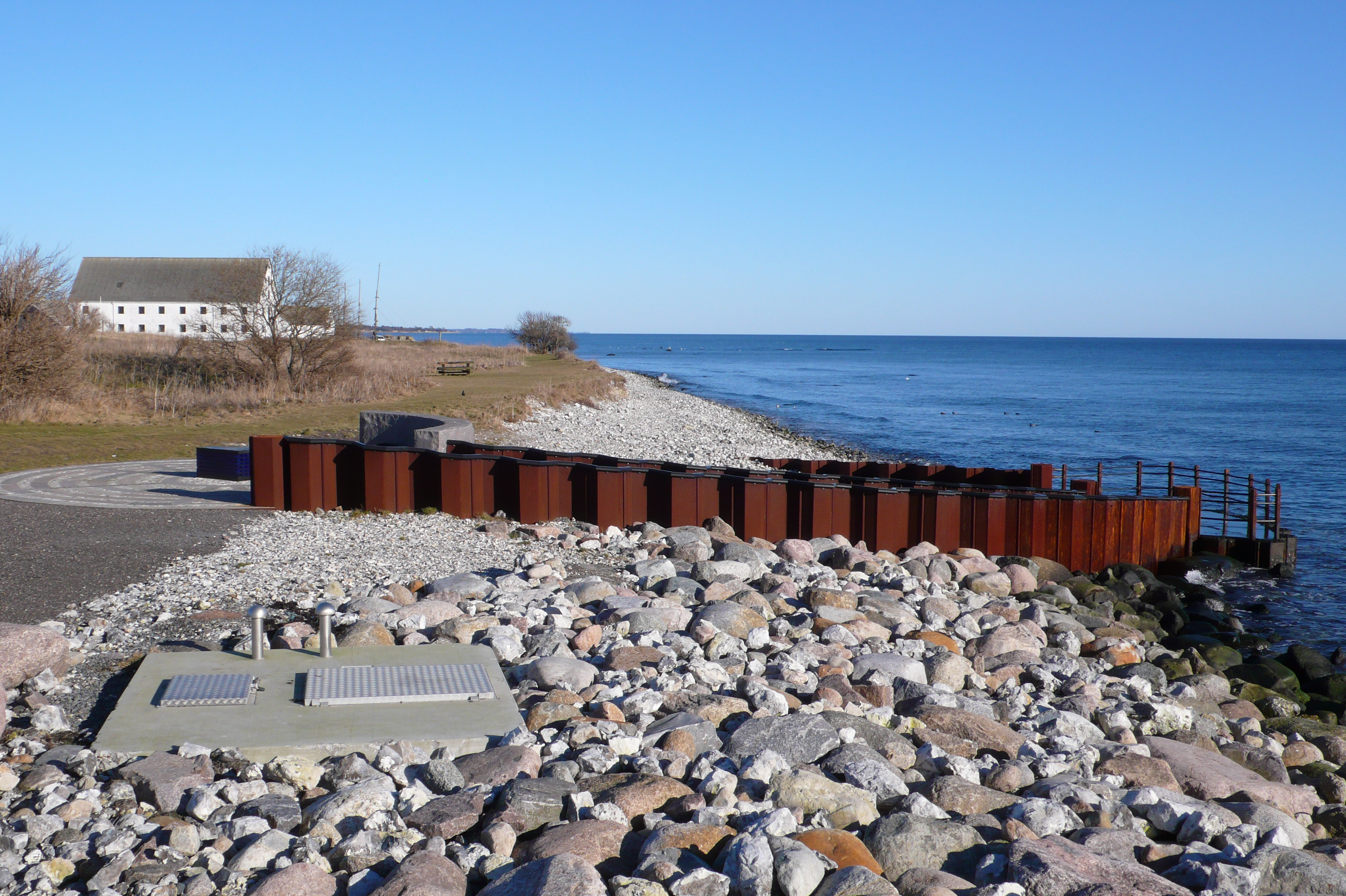 Smygehuk, Schwedens südlichster Punkt